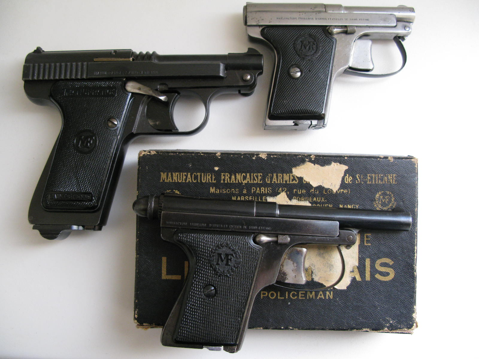 Serie de le francais de la Manu. en haut un 6.35 nickelé à 8 coups au milieu un 7.65 à 9 coups en bas le modéle "policeman 6.35 à 8 coups